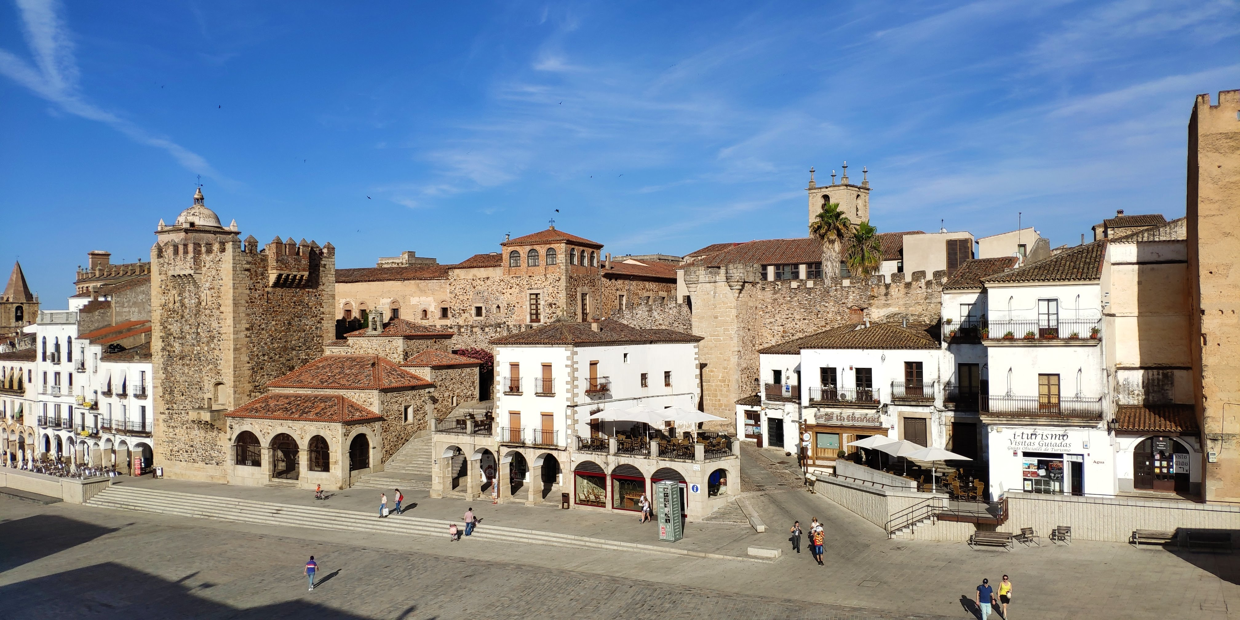 Parte antigua de Cáceres, Extremadura, España